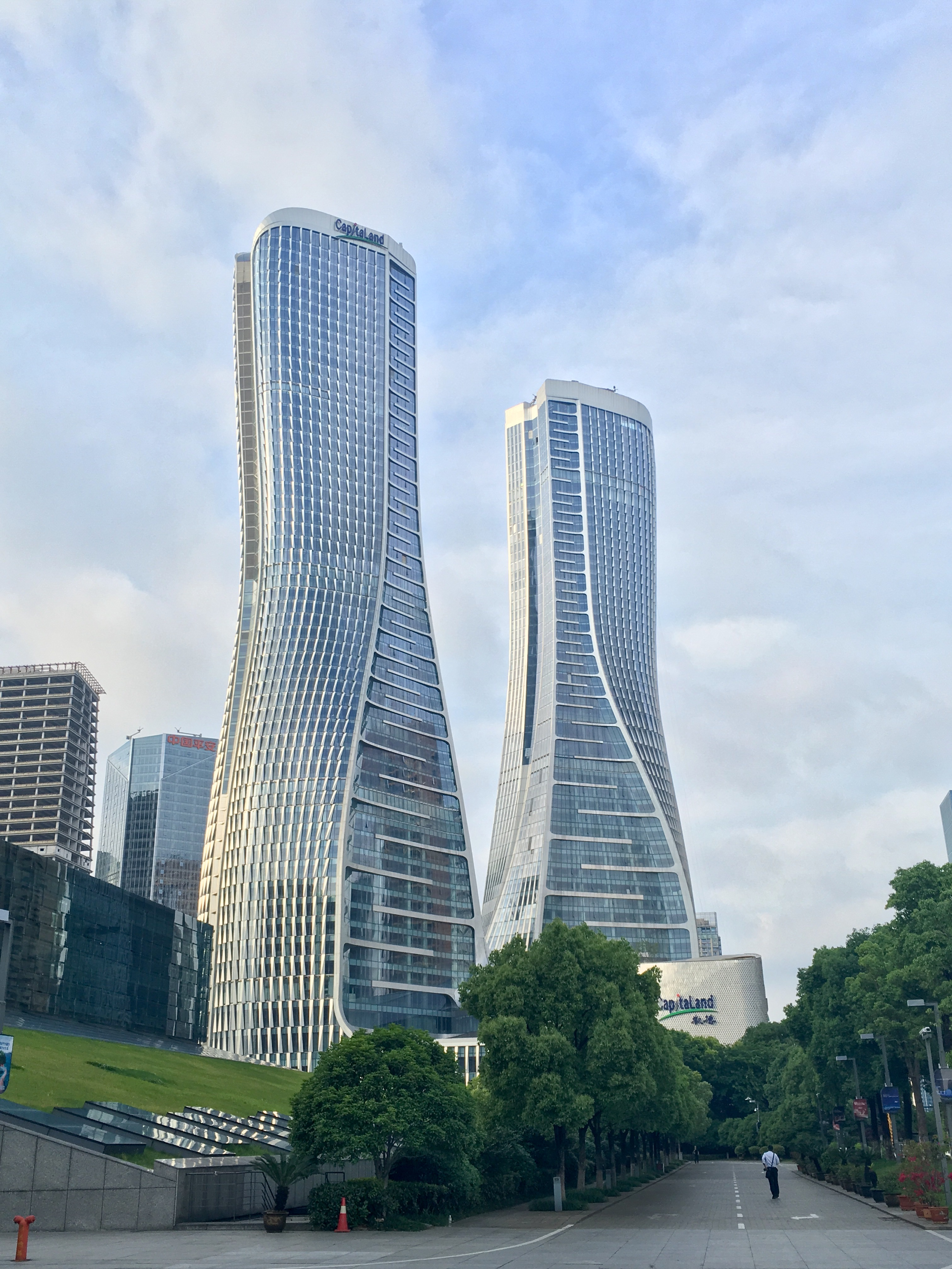 中文（中国大陆）: 从市民中心看杭州来福士城